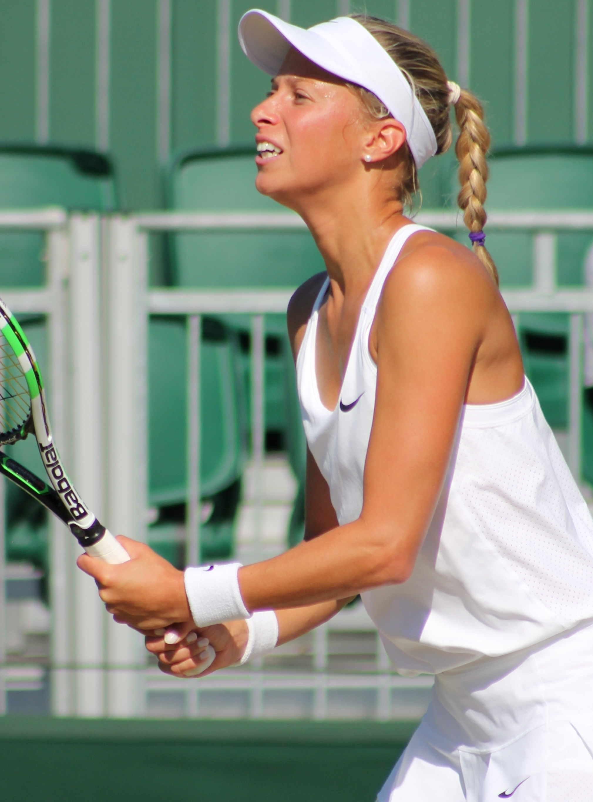 Hlavackova WM14 (34)